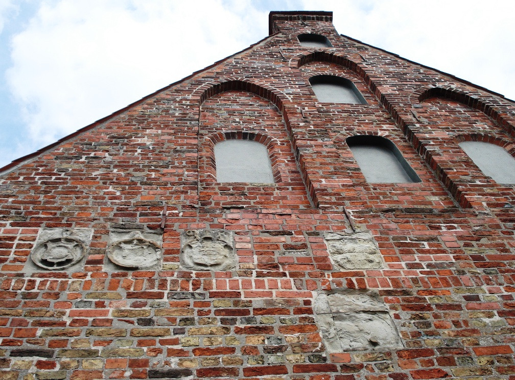 Bad Schwartau - Georgskapelle - Ansicht des Giebels